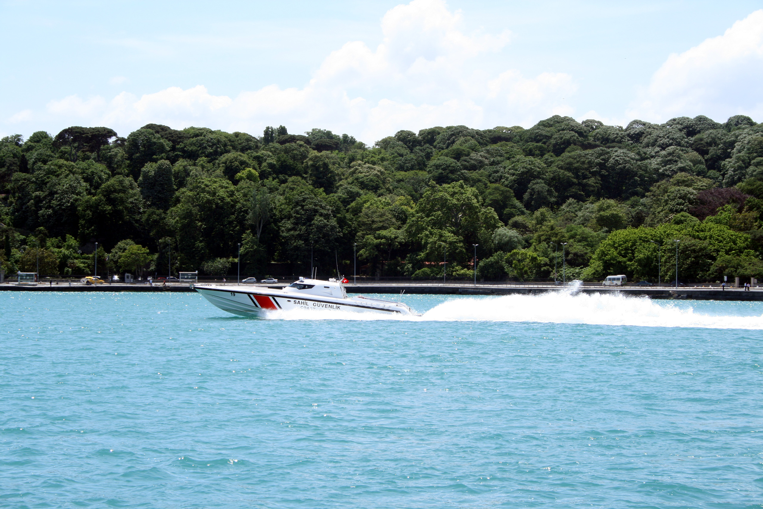 Navire des garde-côtes turcs dans le Bosphore